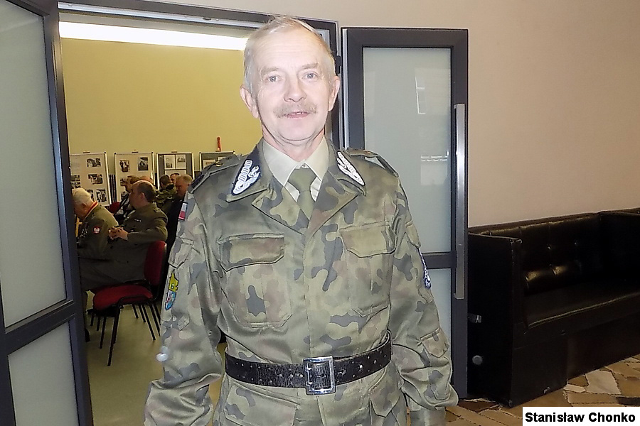 marszałek ZS Marszałek Chomko